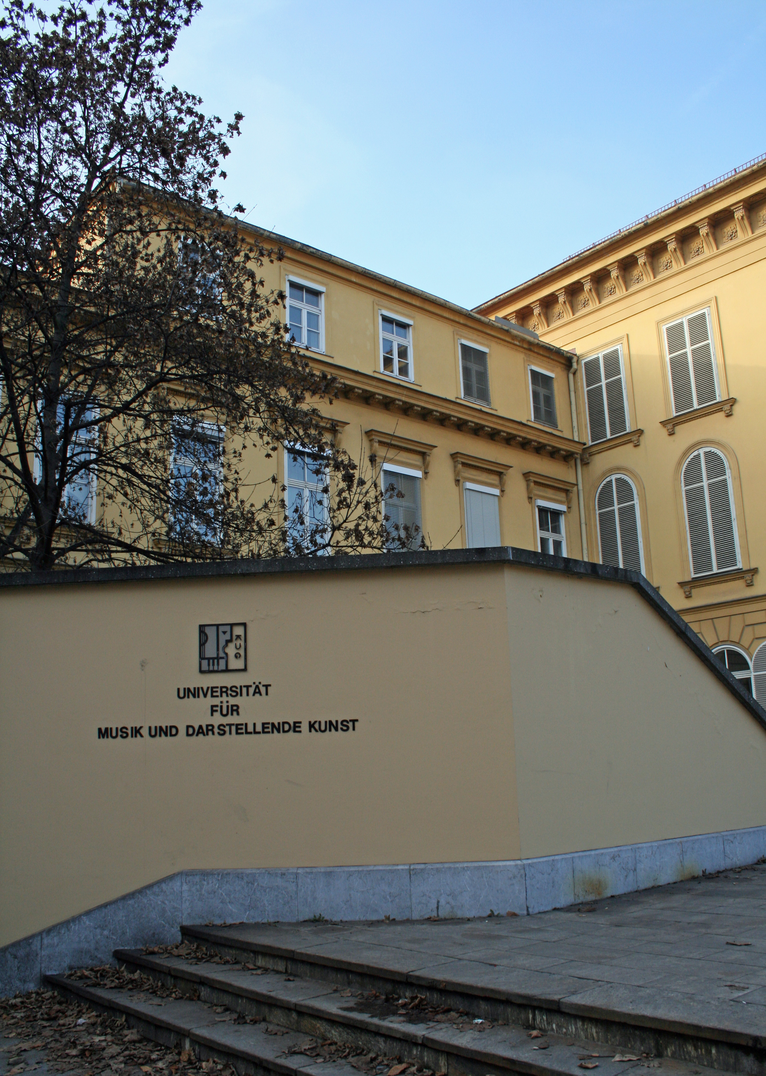 Graz, Austria: Universität für Musik und darstellende Kunst Graz